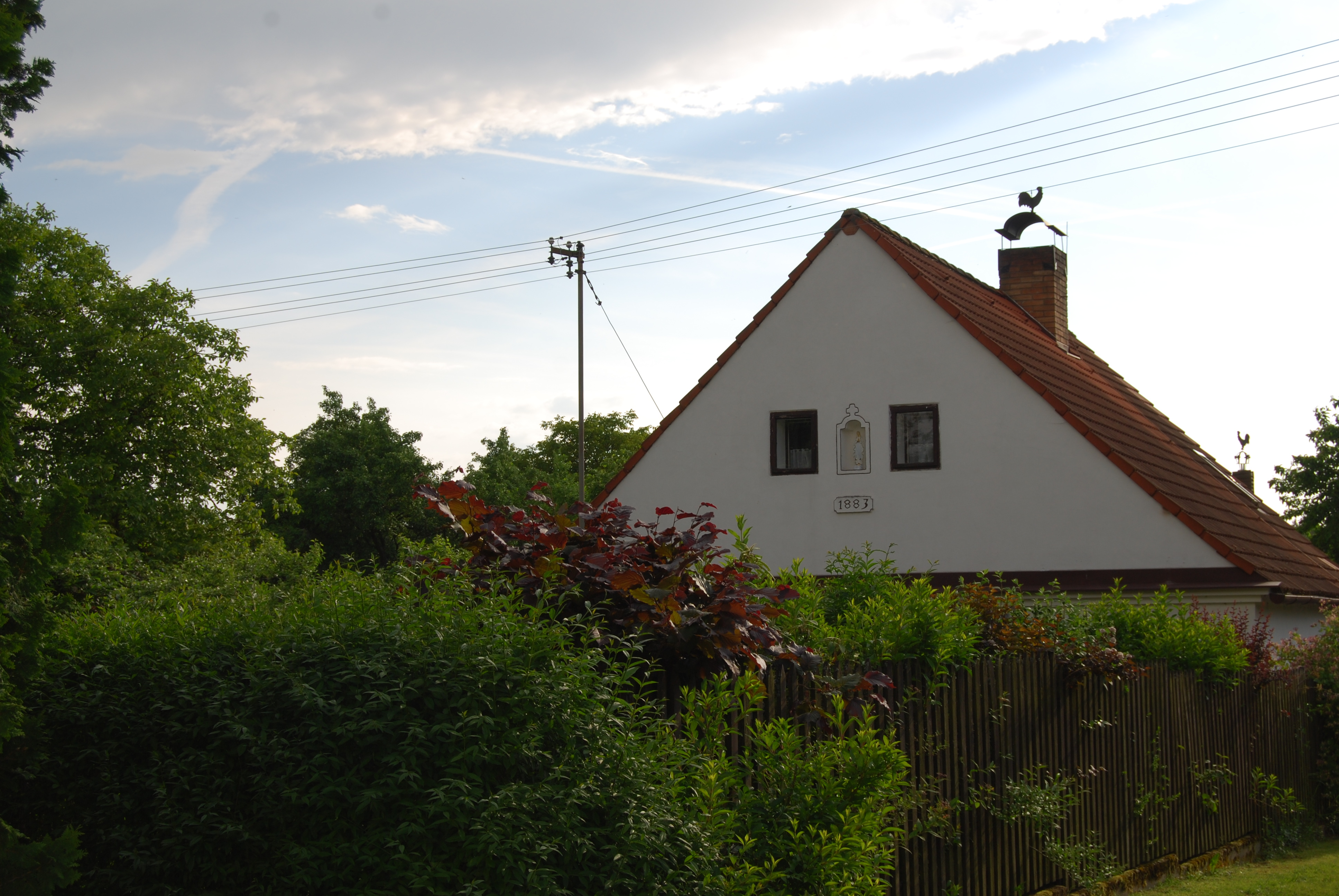 Usedlost v obci. Stráž je malá vesnice, část města Mirotice v okrese Písek. Česká republika.